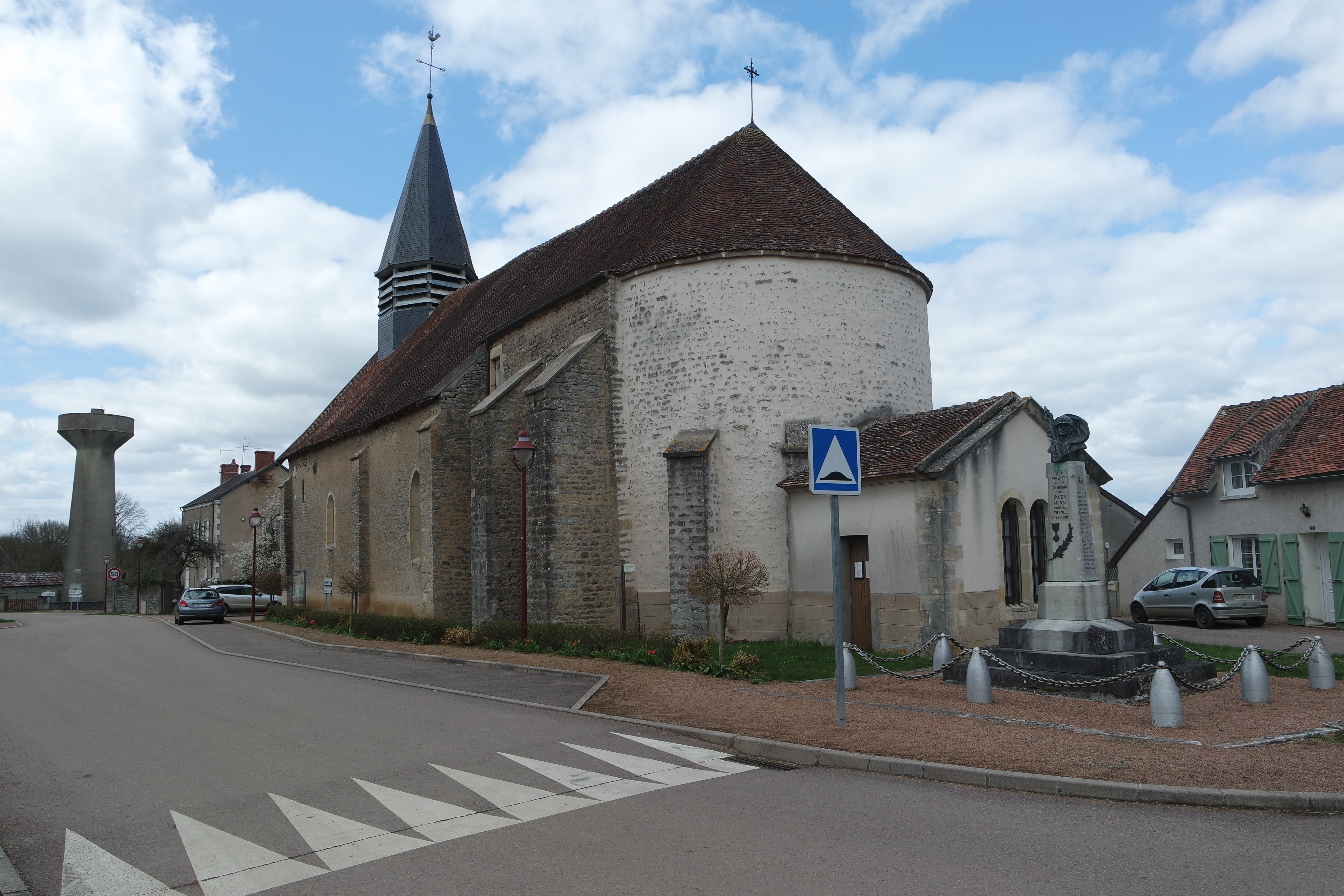 L'église Saint-Prix, et le monument aux morts, à Pazy, Nièvre, France.